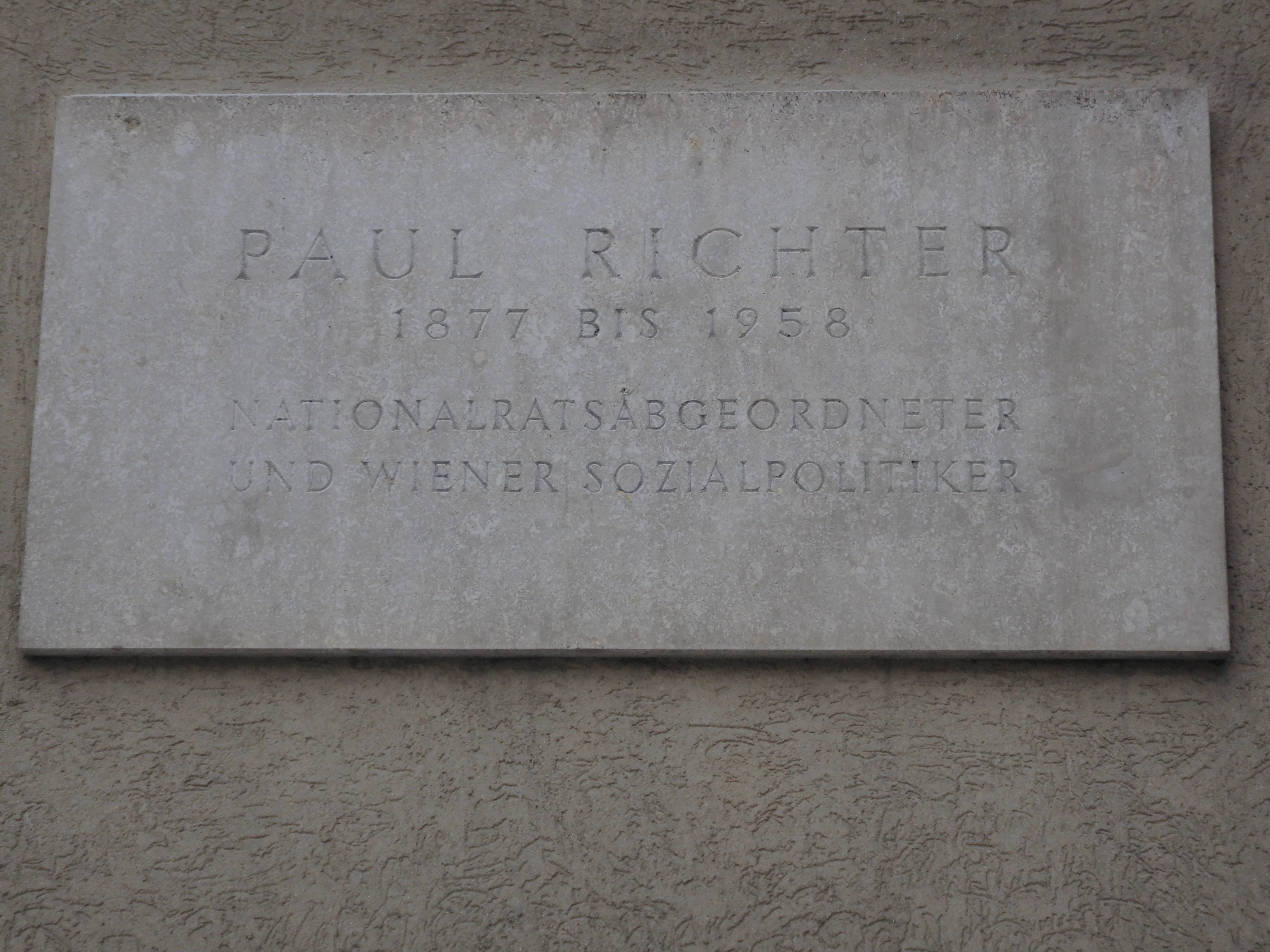 Gedenktafel für Paul Richter (Wien, Grimmgasse 36 - 38)